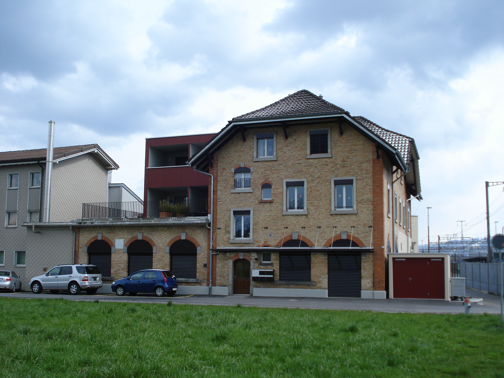 Landi Rotkreuz